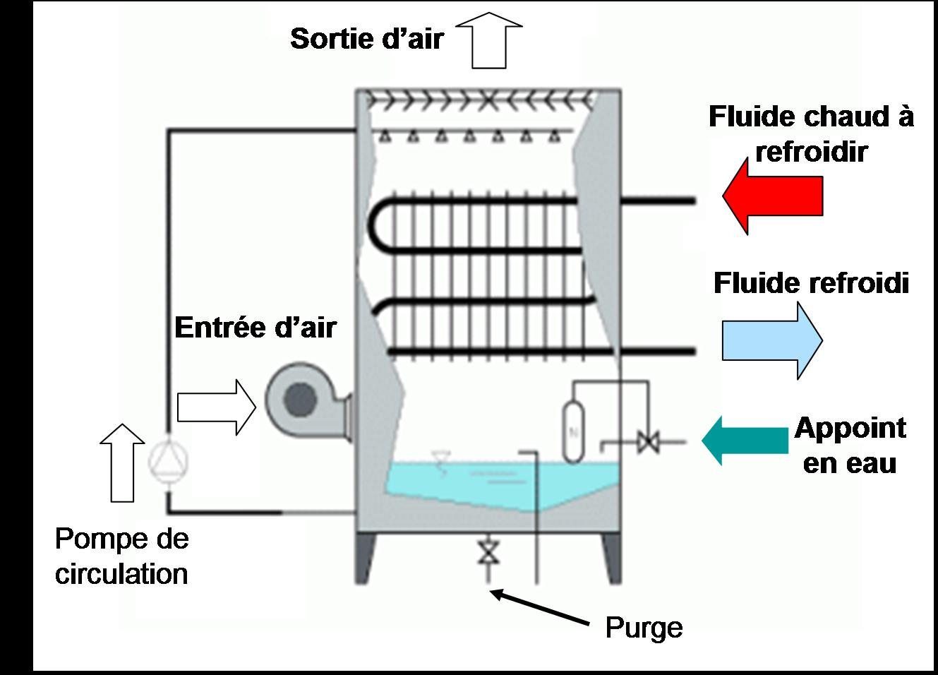 TAR